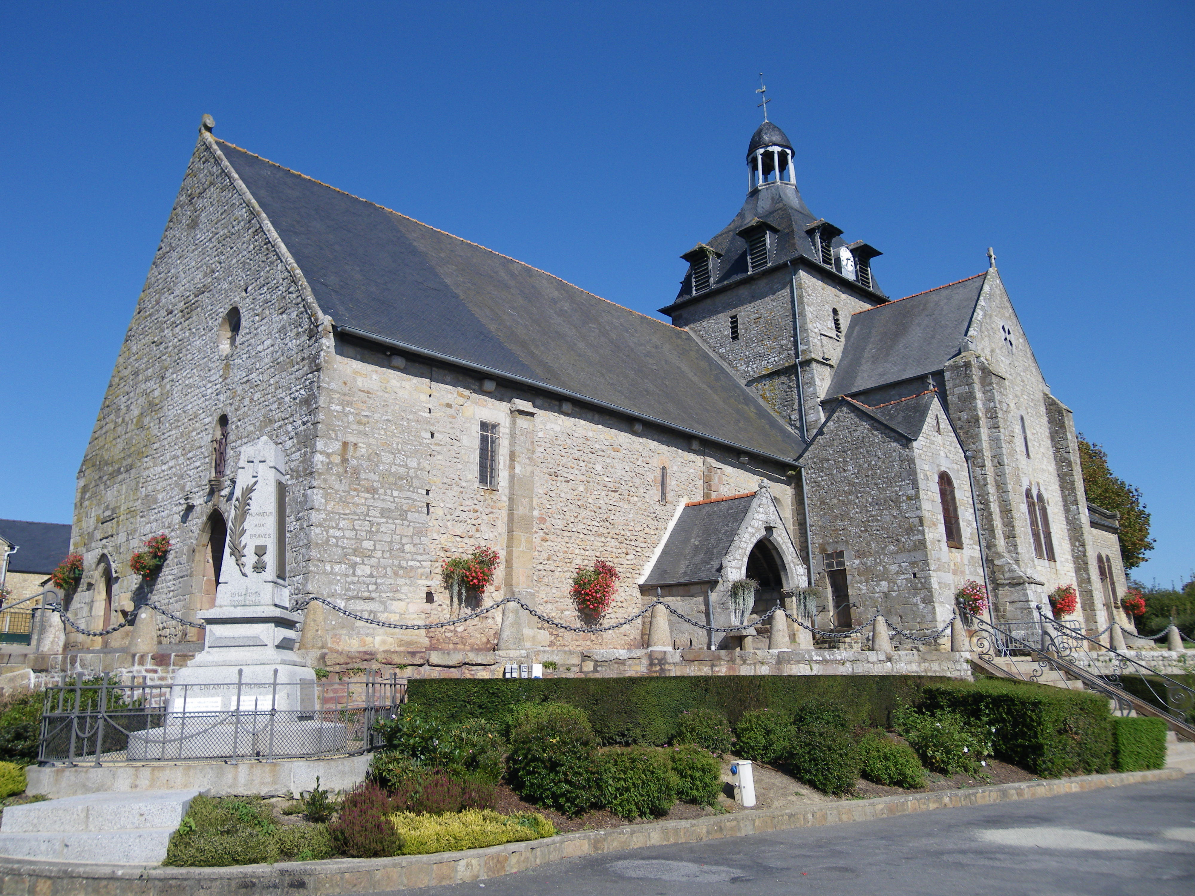 l'eglise de tremblay